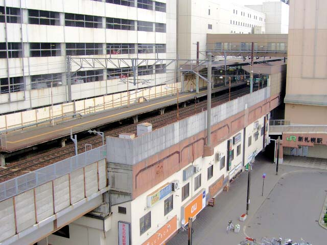 唯一駅が外から見えるところ。 撮影場所 近くの雑居ビル